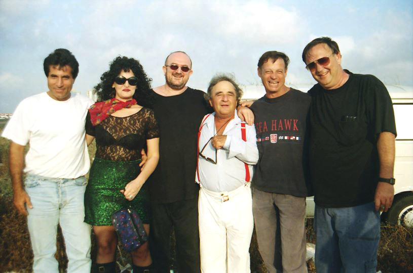 גדי יגיל בצוות פיספוסים יגאל שילון יעקב בן סירא אפרים שמיר